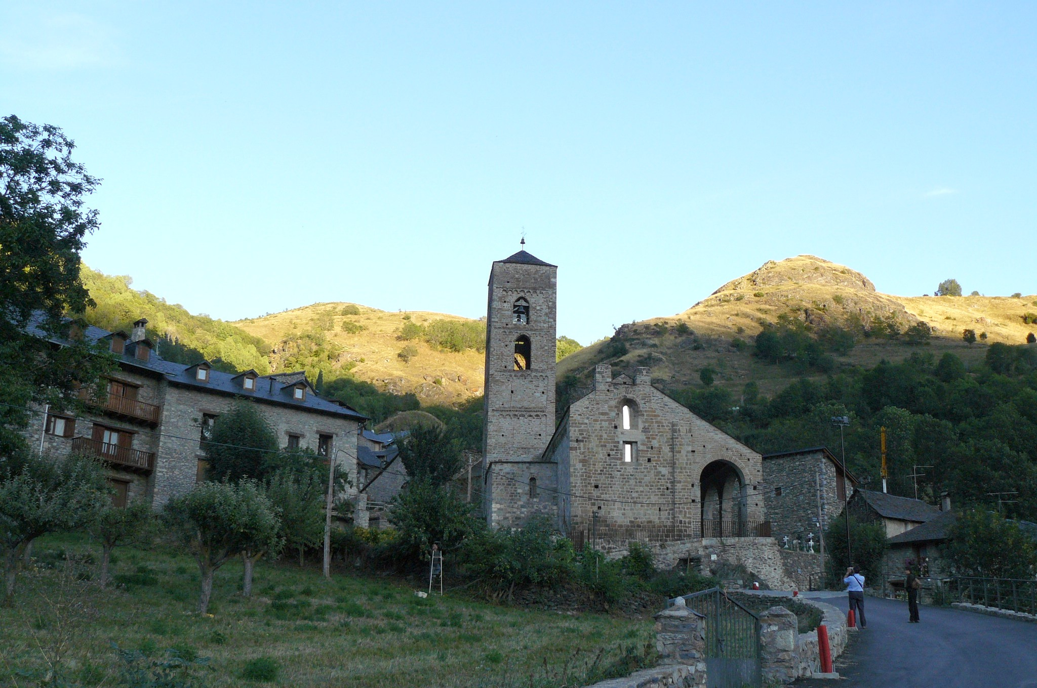 Parte del pueblo de Durro e iglesia de la Nativitat